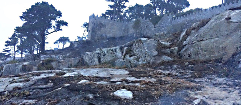 Efectos do incendio na contorna do parador de Baiona, a primeiras horas deste luns.